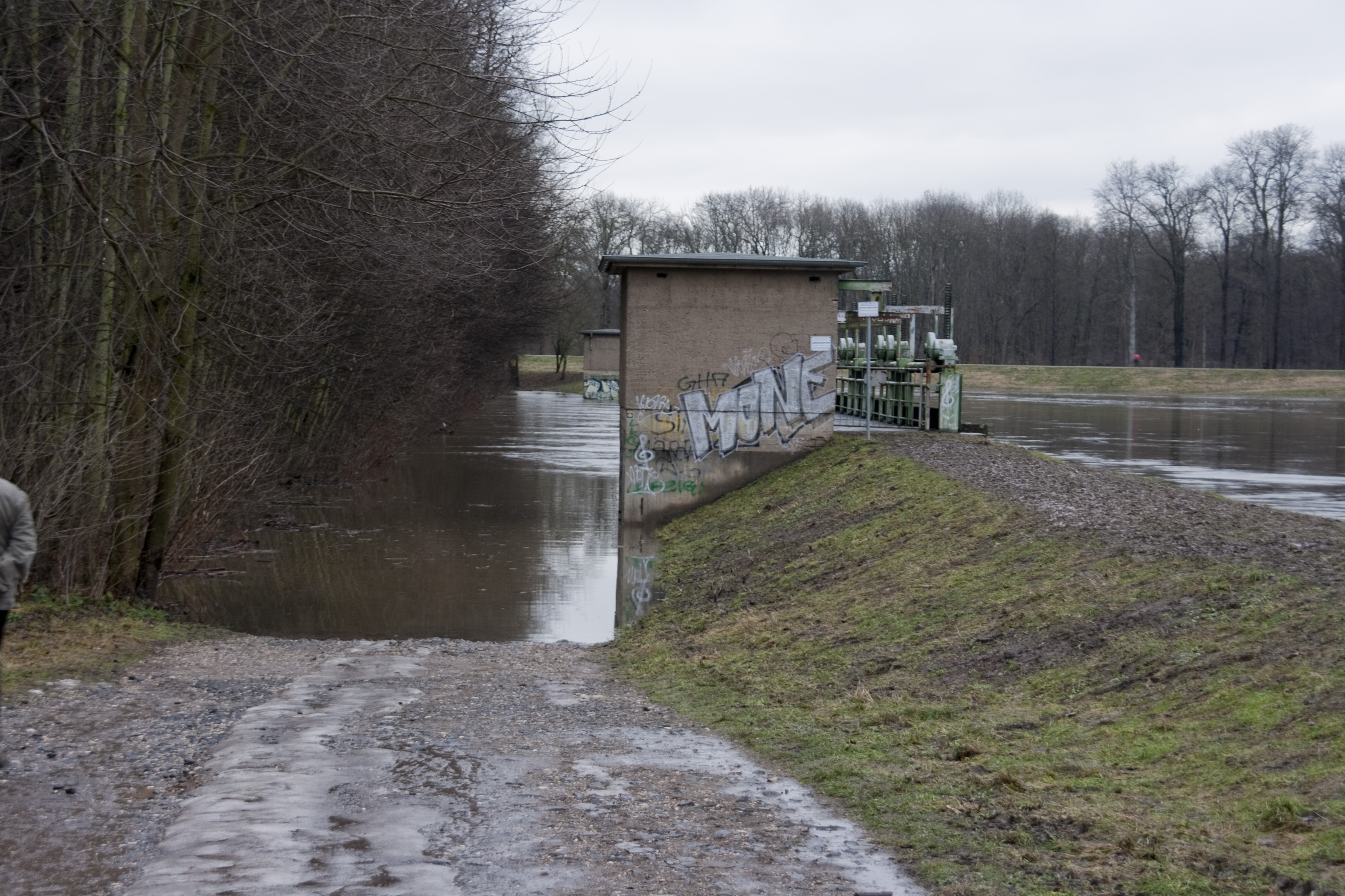 Öffnung des Nahle-Auslassbauwerk am 14.01.2011